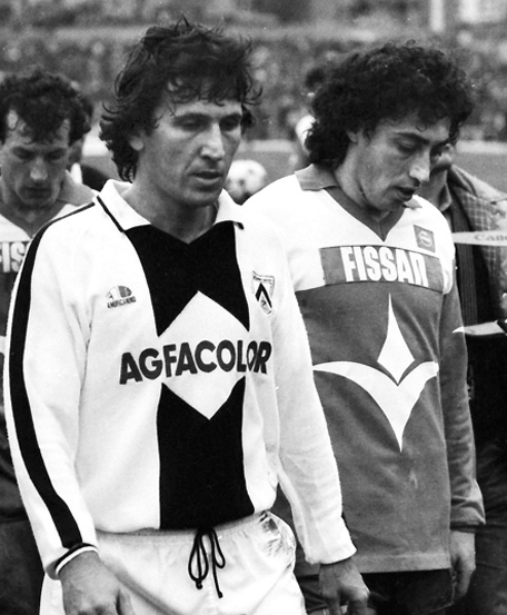 Trieste, stadio Giuseppe Grezar, 8 febbraio 1984. Il fantasista bianconero Zico (a sinistra) e l'attaccante biancorosso Franco De Falco (a destra) in occasione del derby regionale tra e (0-0) valevole per l'andata degli ottavi di finale della Coppa Italia 1983-1984. Licensing Zico, 1984 02 08 1984 02 08 1984 02 08